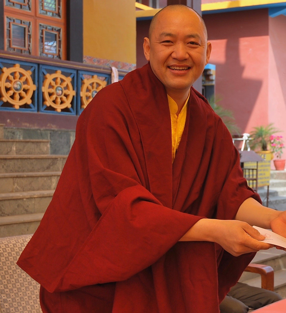 ميريت عمر الحريري مع الفنان سمير صبري و سيد عبد العزيز